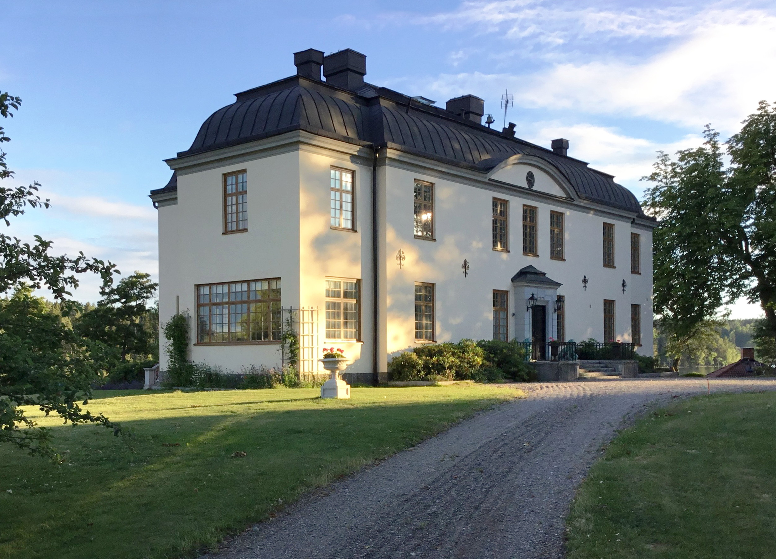 Boxtorp säteri, framsidan, 2018